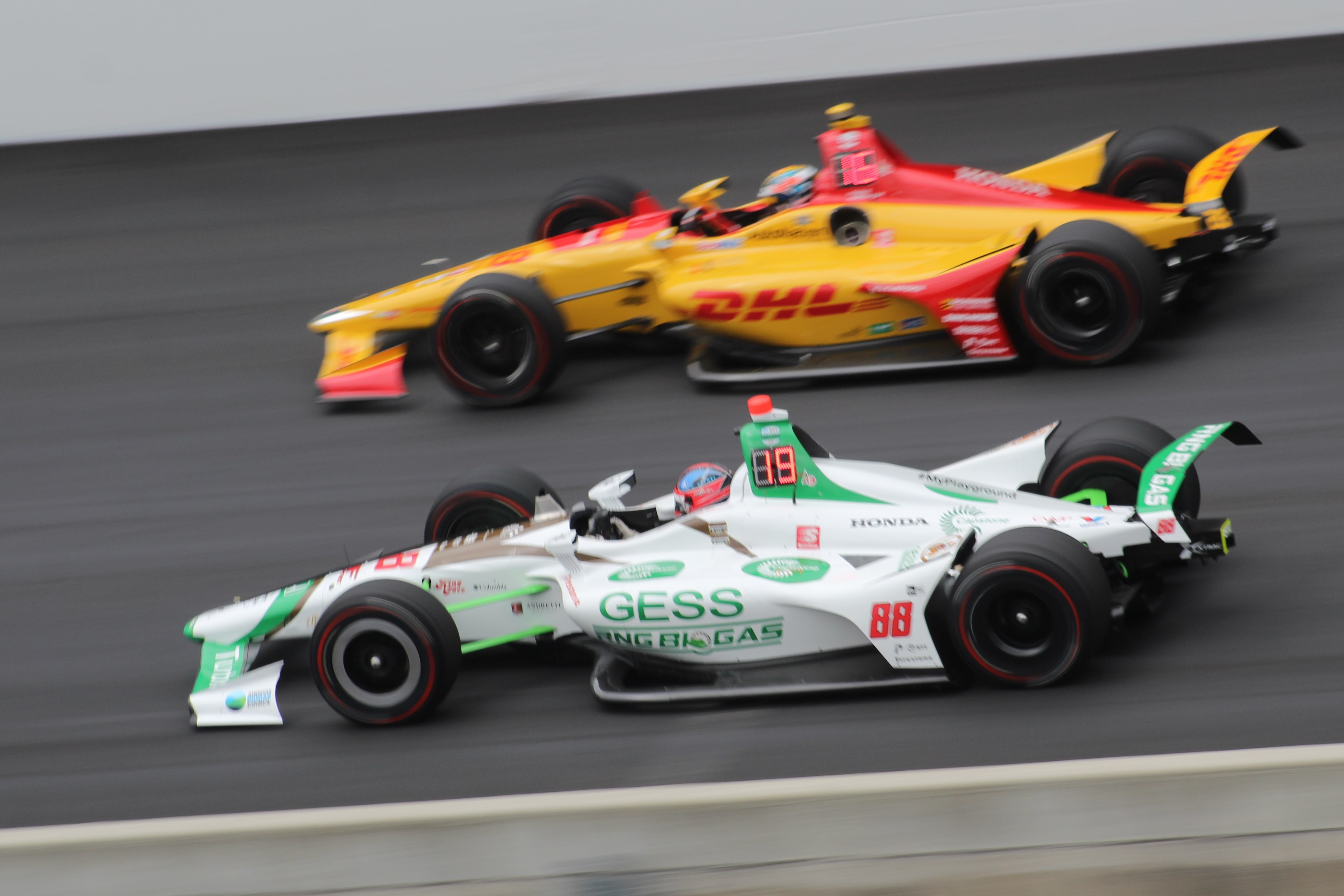 2019 Indianapolis 500